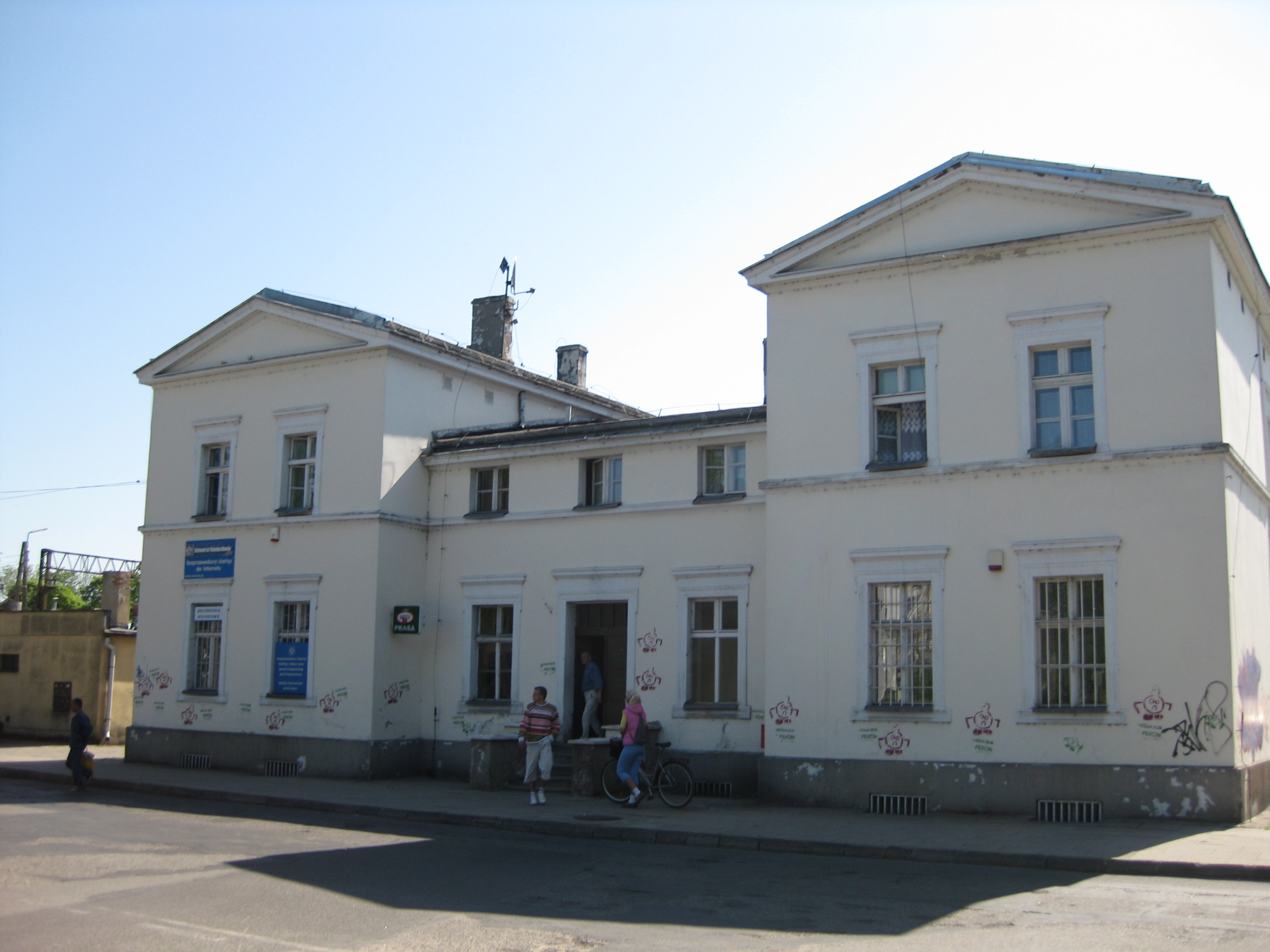 Budynek stacji kolejowej Mosina